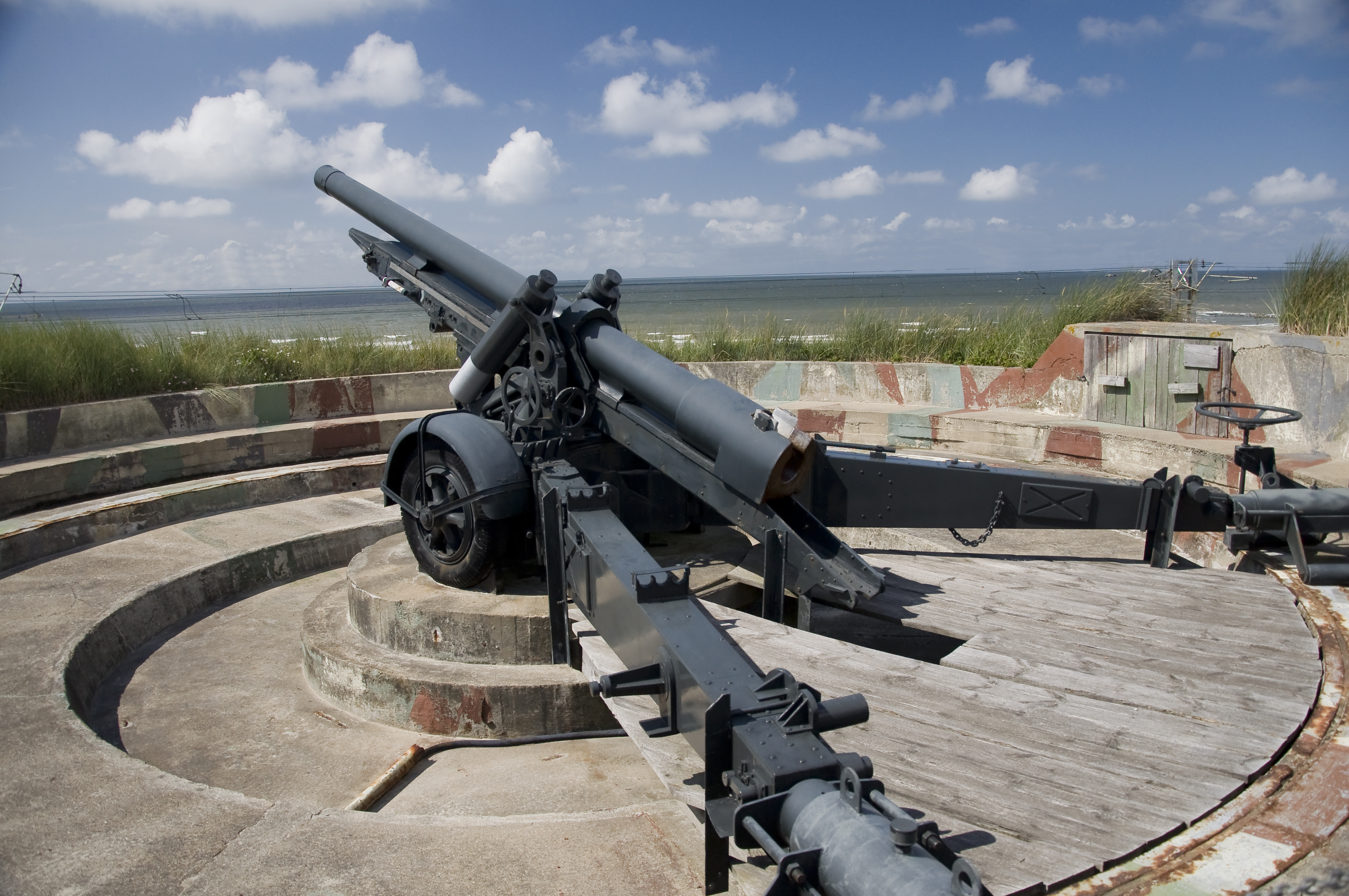 Een stelling van het Openluchtmuseum Atlantikwall te Raversijde, Oostende, België, met een Belgisch 12 cm K370 kanon